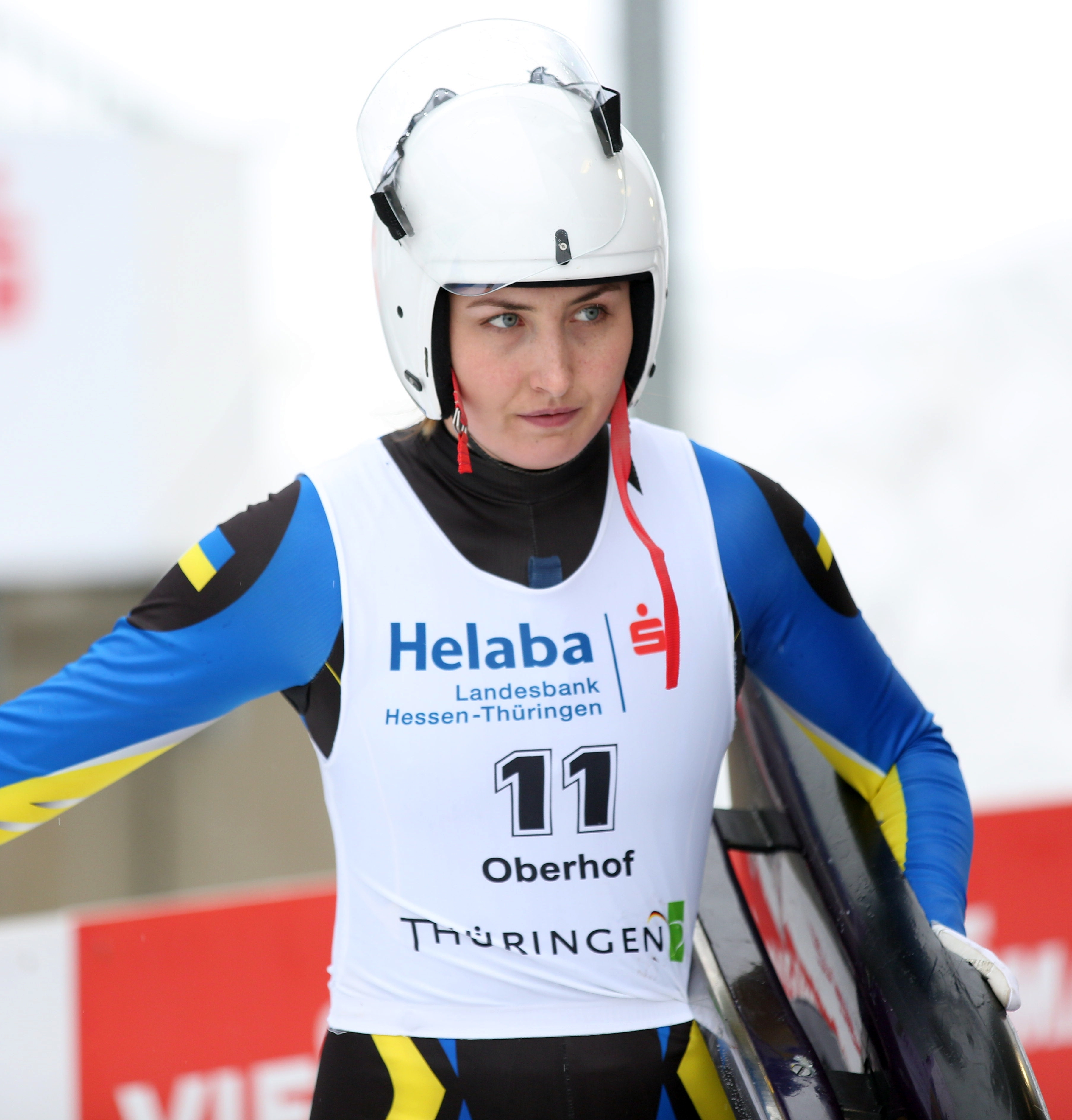 Olena Stetskiv beim HELABA Nationscup der Damen in Oberhof 2017